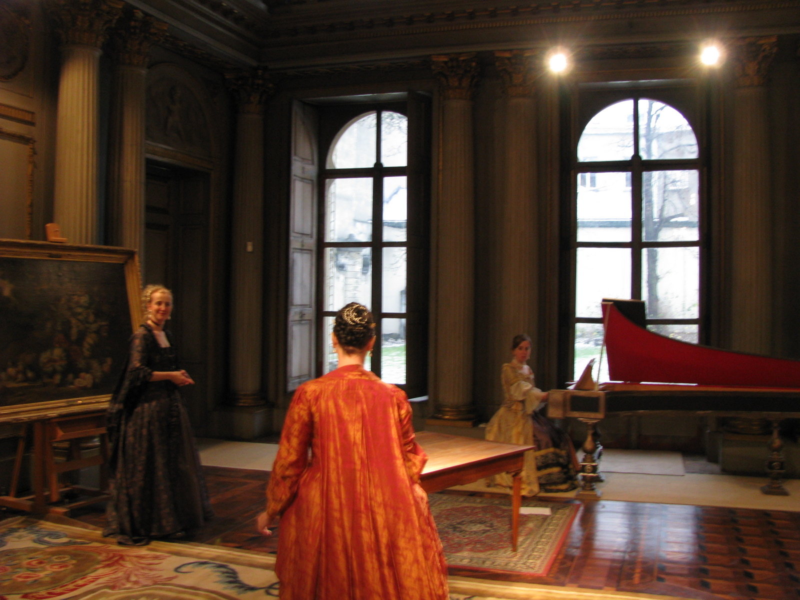 Ghent